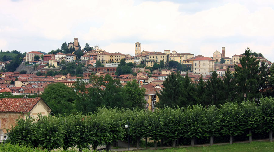 Panorama di Castelnuovo Don Bosco (AT)